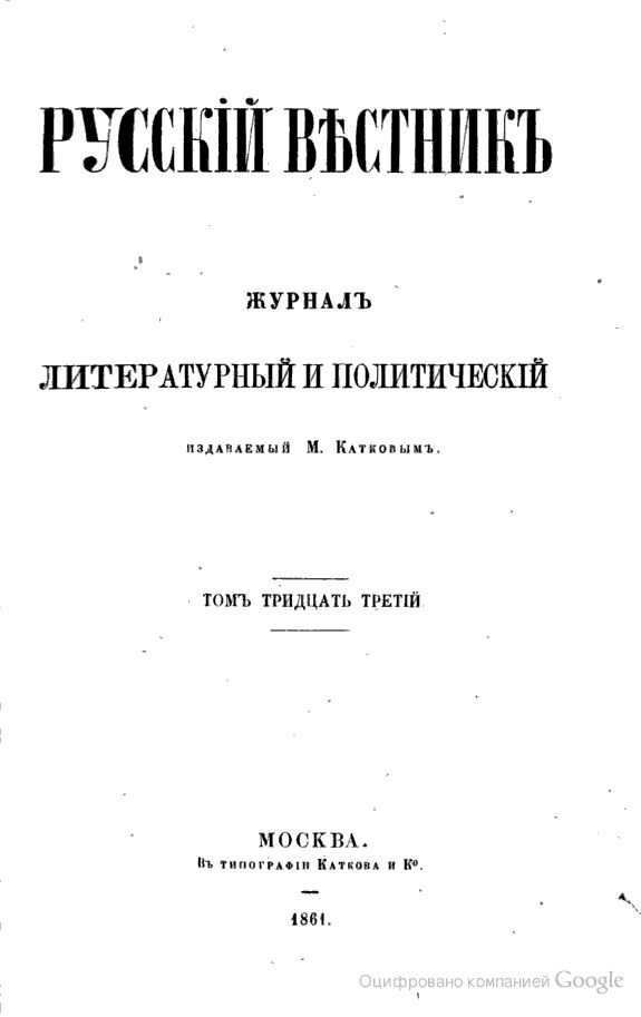 Обложка журнала "Русский вестник"